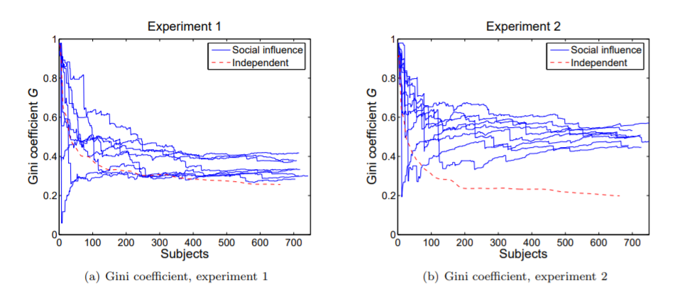 תיאור תוצאות שני הניסויים שנמדדו בעזרת מדד ג'יני